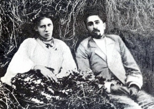 Леся Украінка з мінскім сацыял-дэмакратам Сяргеем Мяржынскім